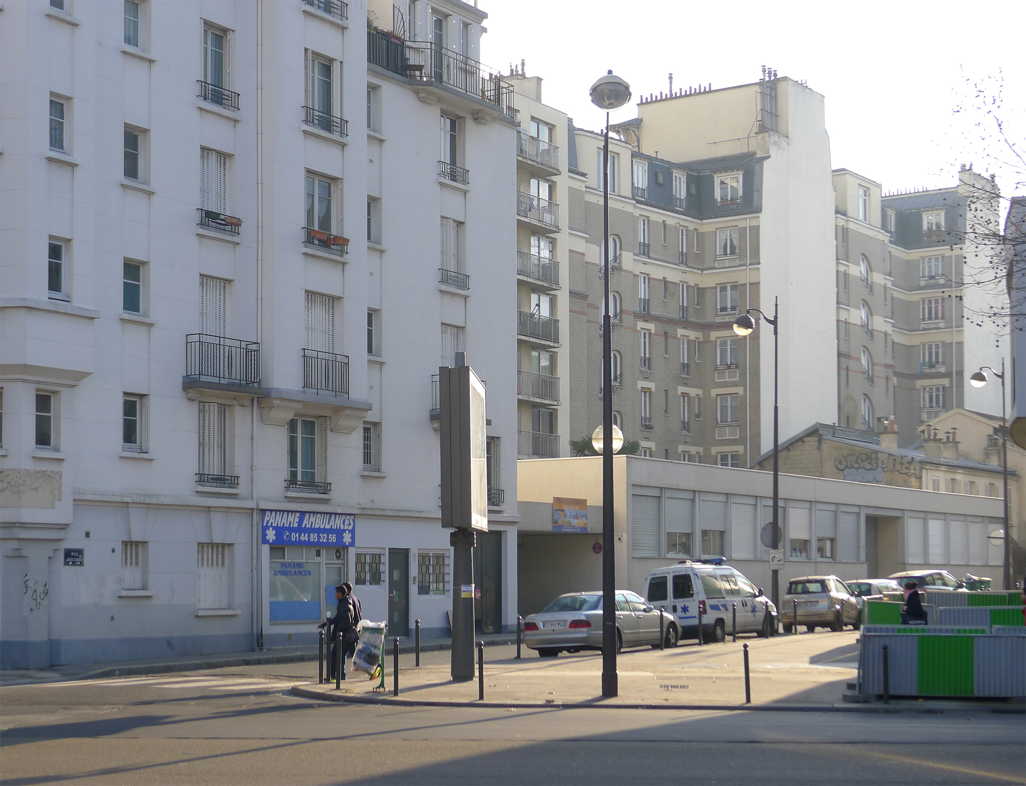 Rue Jules-Cloquet - Paris XVIII